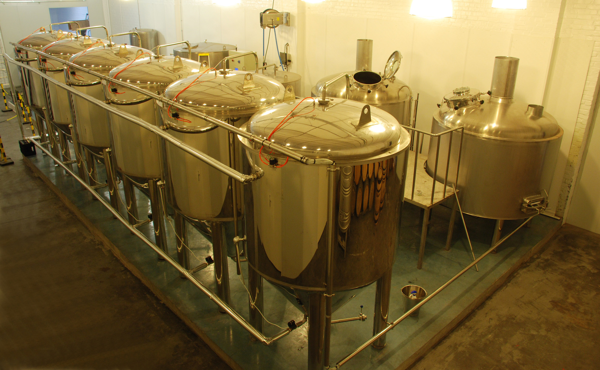 Brouwerij Alvinne te Moen (Kortrijk)